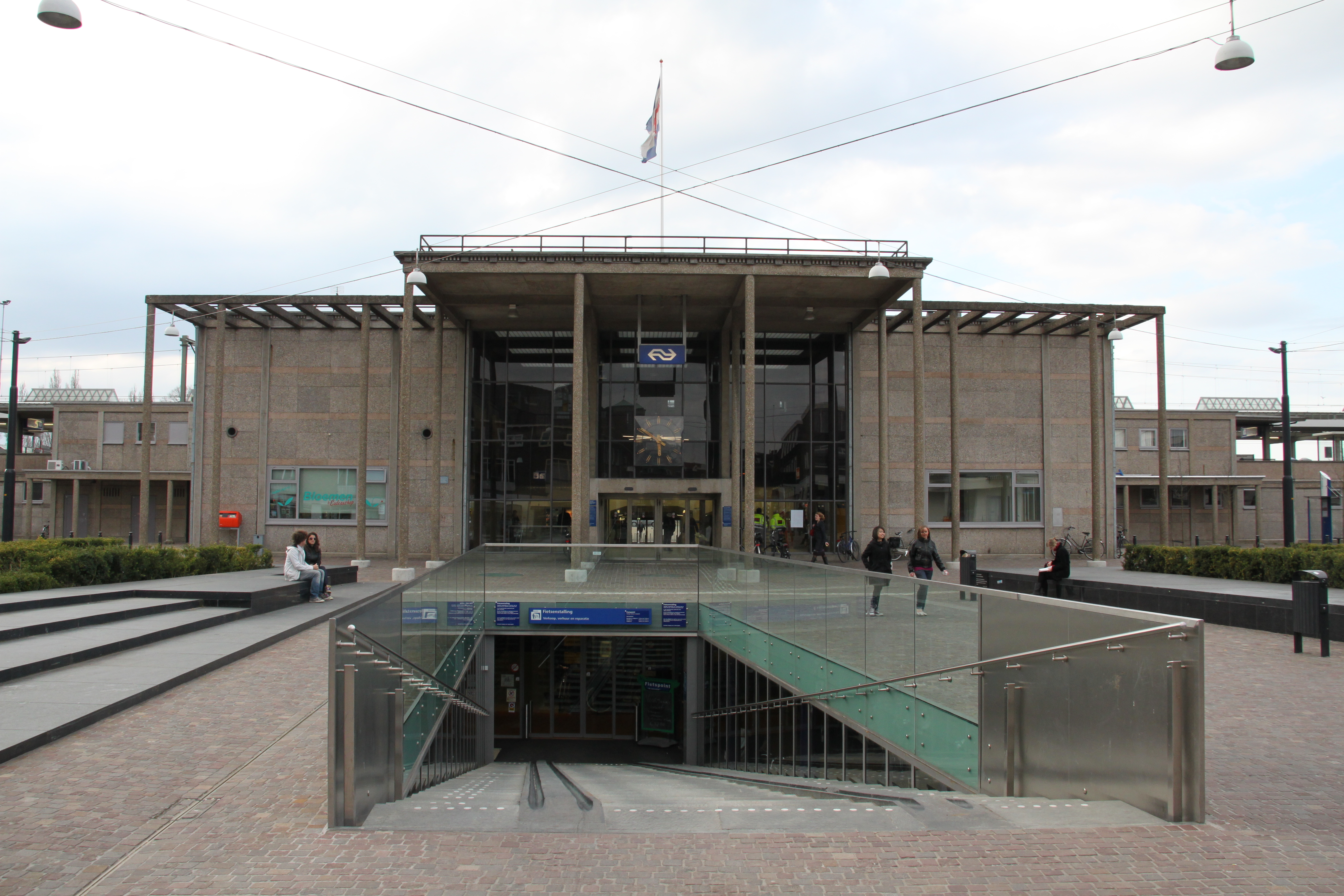 Het voorplein van station Zutphen.